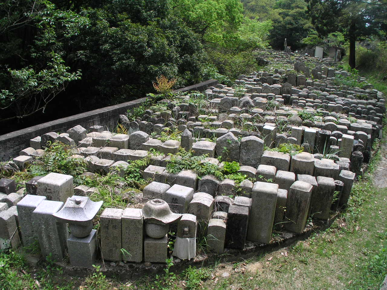 伊屋ヶ谷沿いの無縁仏